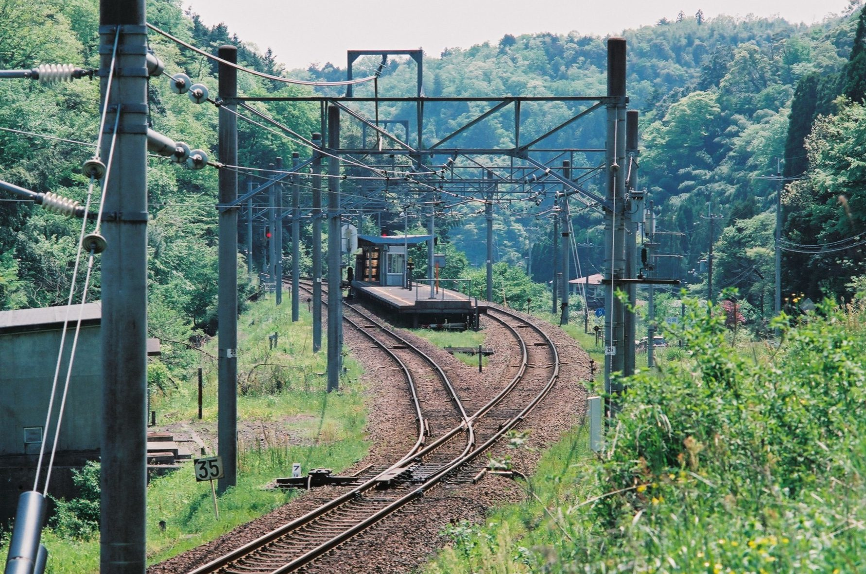 北近畿タンゴ鉄道宮福線大江山口内宮駅、南を望む